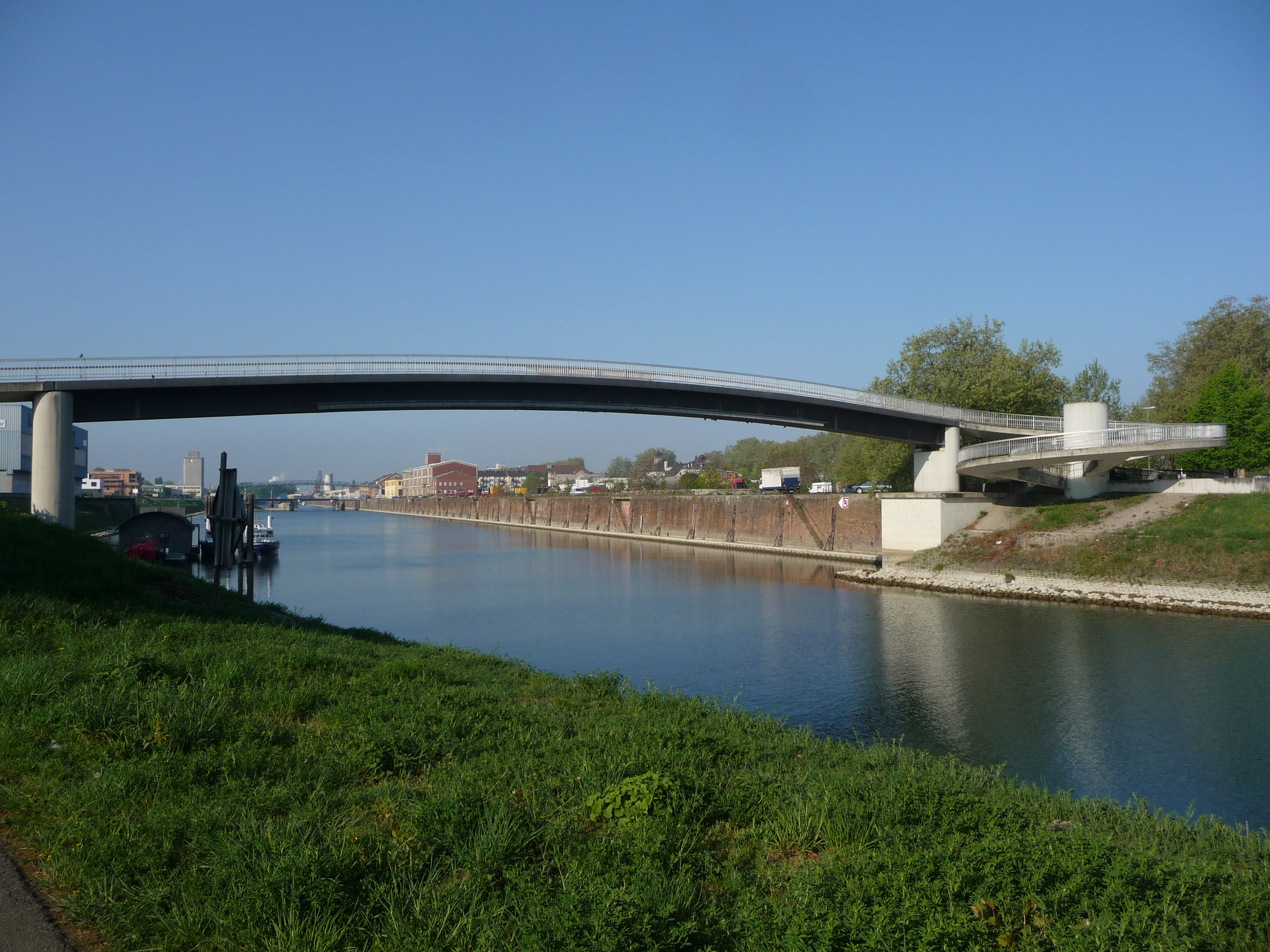 Parkinsel